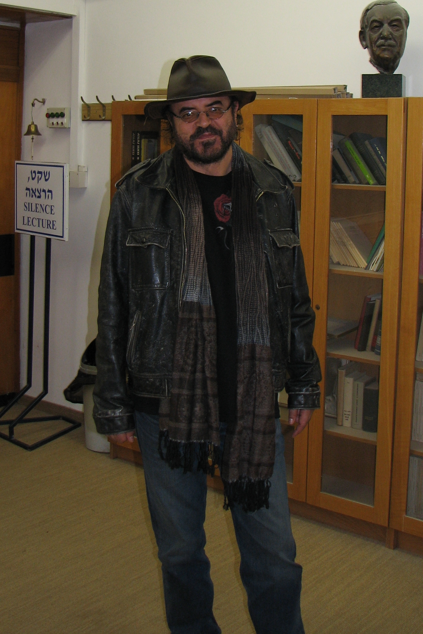 כריסטוס פאפאדימיטריו במרכז לחקר הרציונליות באוניברסיטה העברית בירושלים